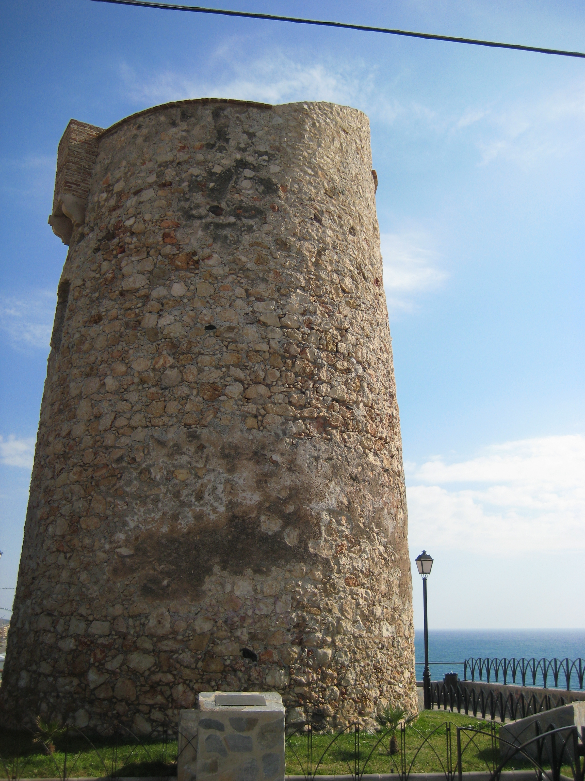 Torre vigía de El Cantal, Rincón de la Victoria, Málaga, España.